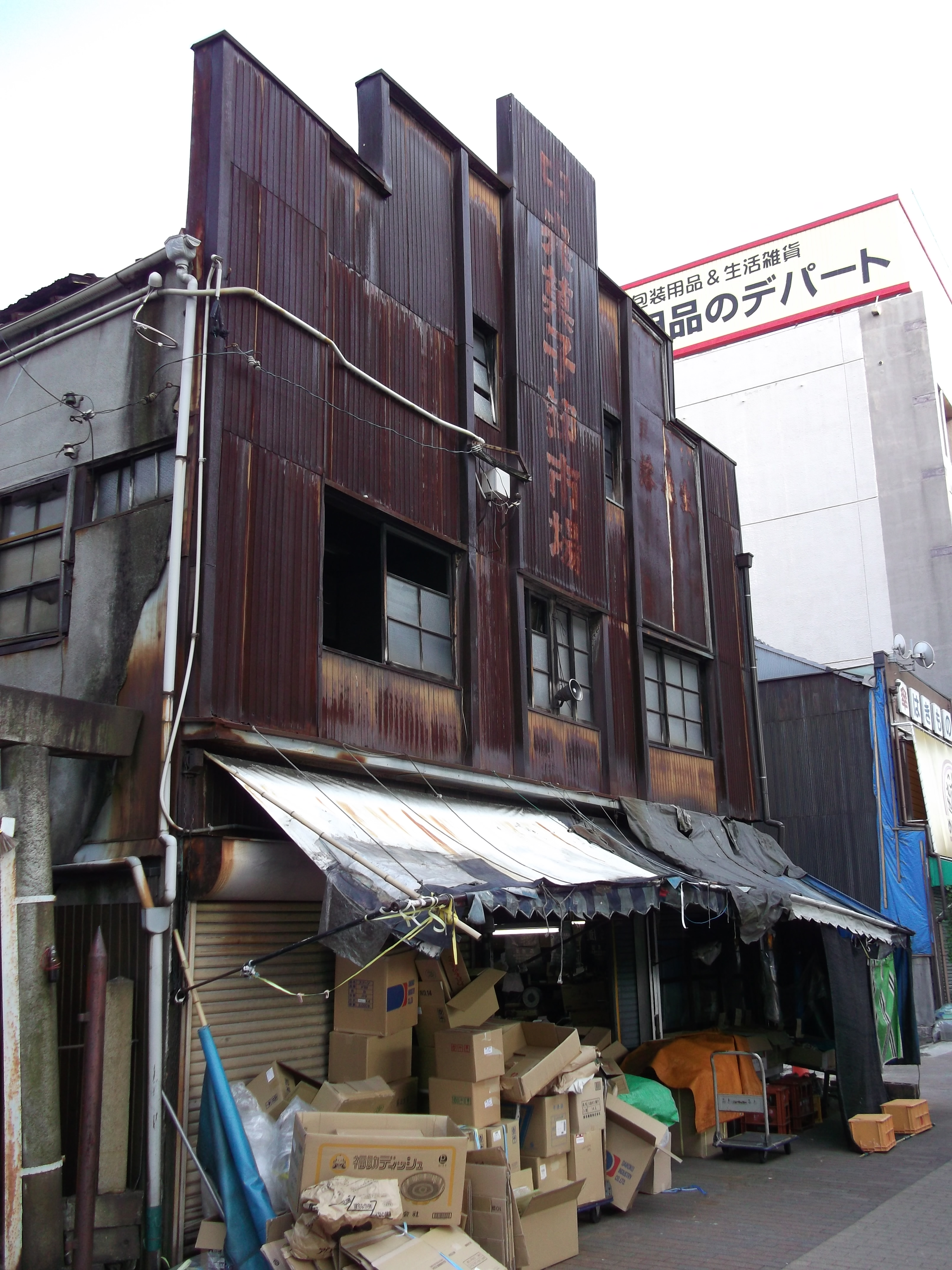 名古屋市西区幅下二丁目にある中央菓子卸売市場